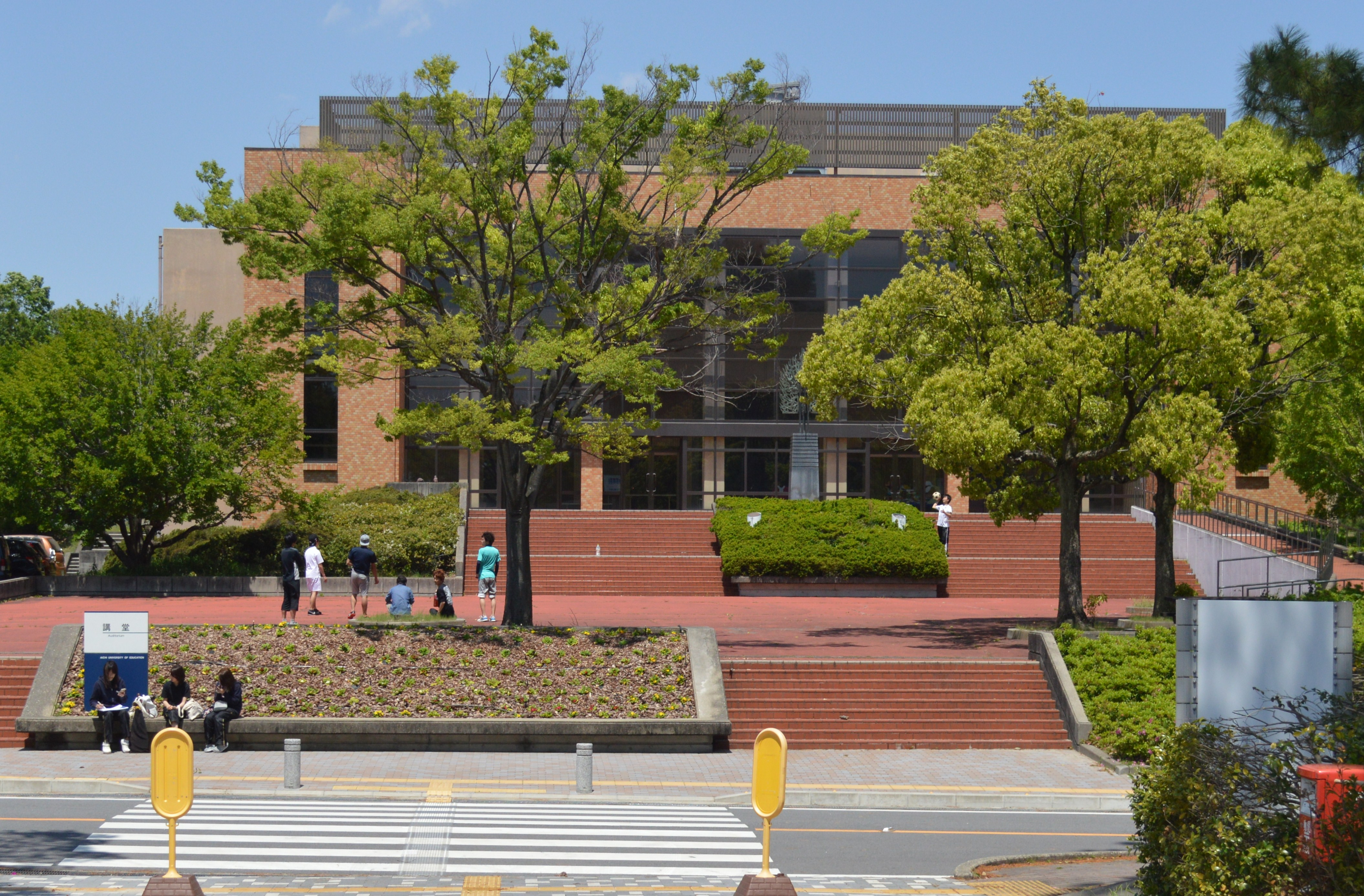 愛知教育大学の講堂、愛知県刈谷市